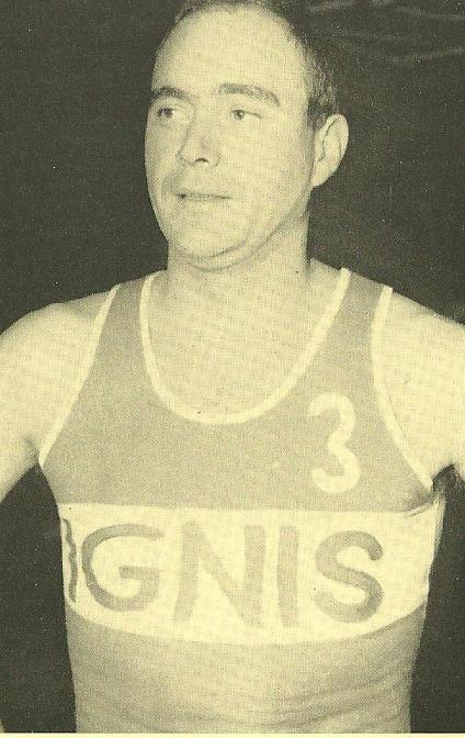 Il cestista Romeo Romanutti con la maglia della Ignis Varese Licensing Categoria:Immagini della Pallacanestro Varese Romanutti